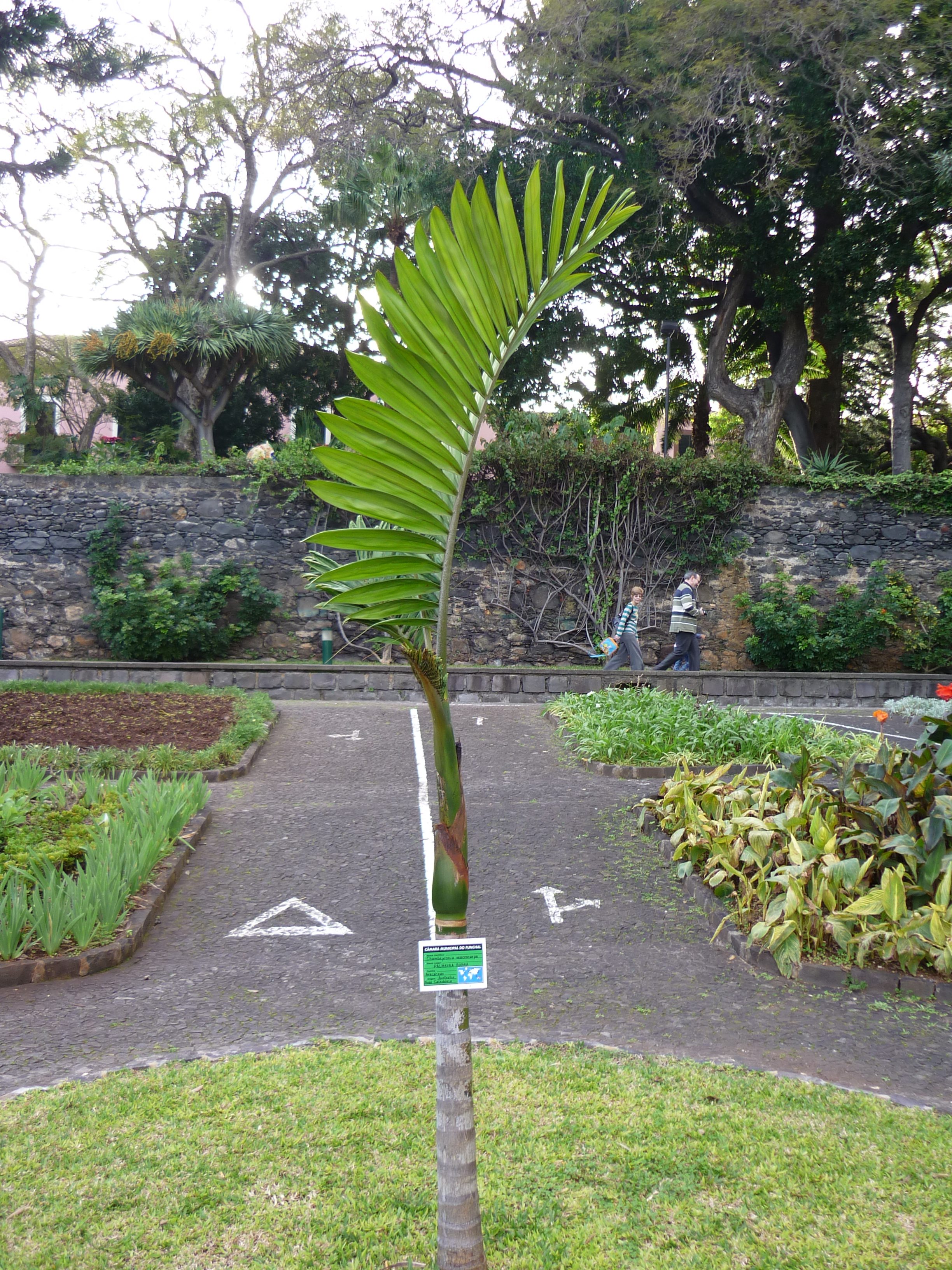 Chambeyronia macrocarpa Funchalban, a Szent Katalin parkban